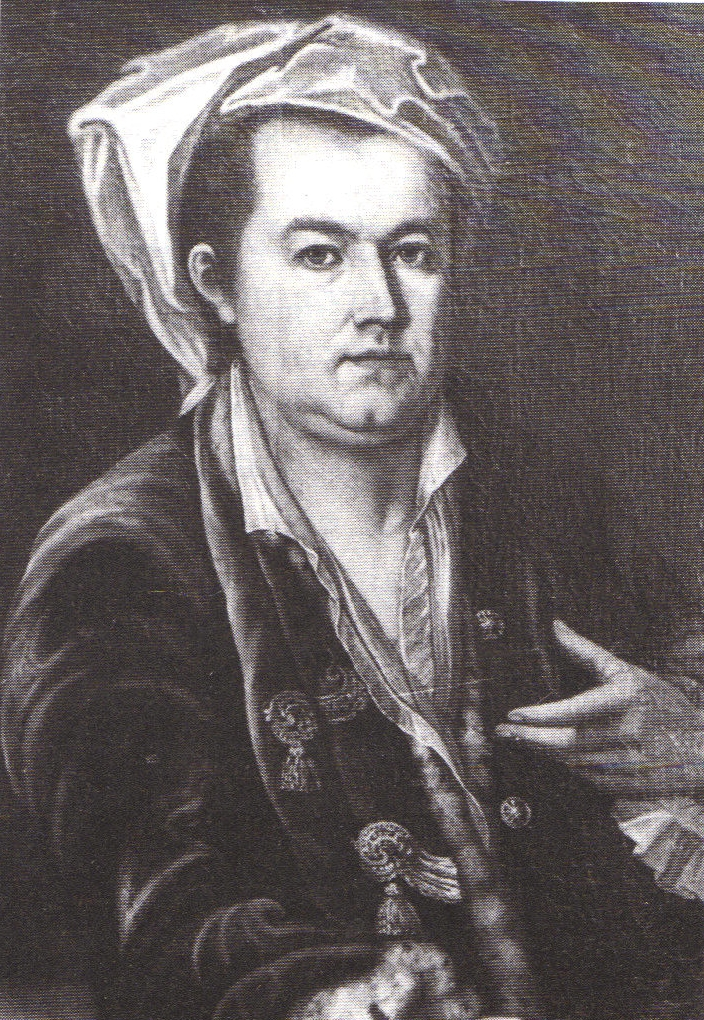 Ölgemälde von Franz Joseph Bodmann im Landesmuseum Mainz (inv. Nr. 660)